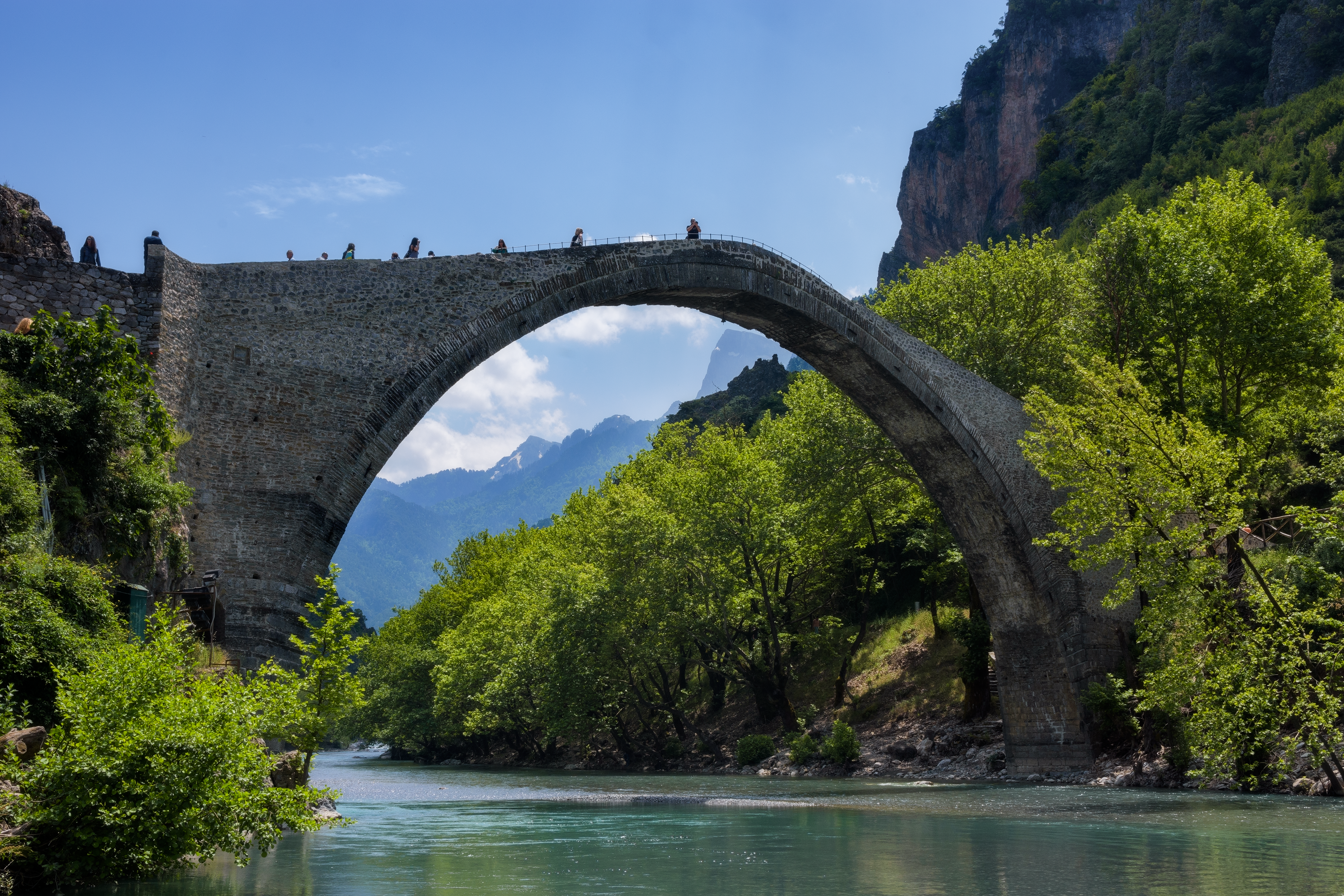 Γεφύρι Κόνιτσας«Γεφύρι Κόνιτσας»